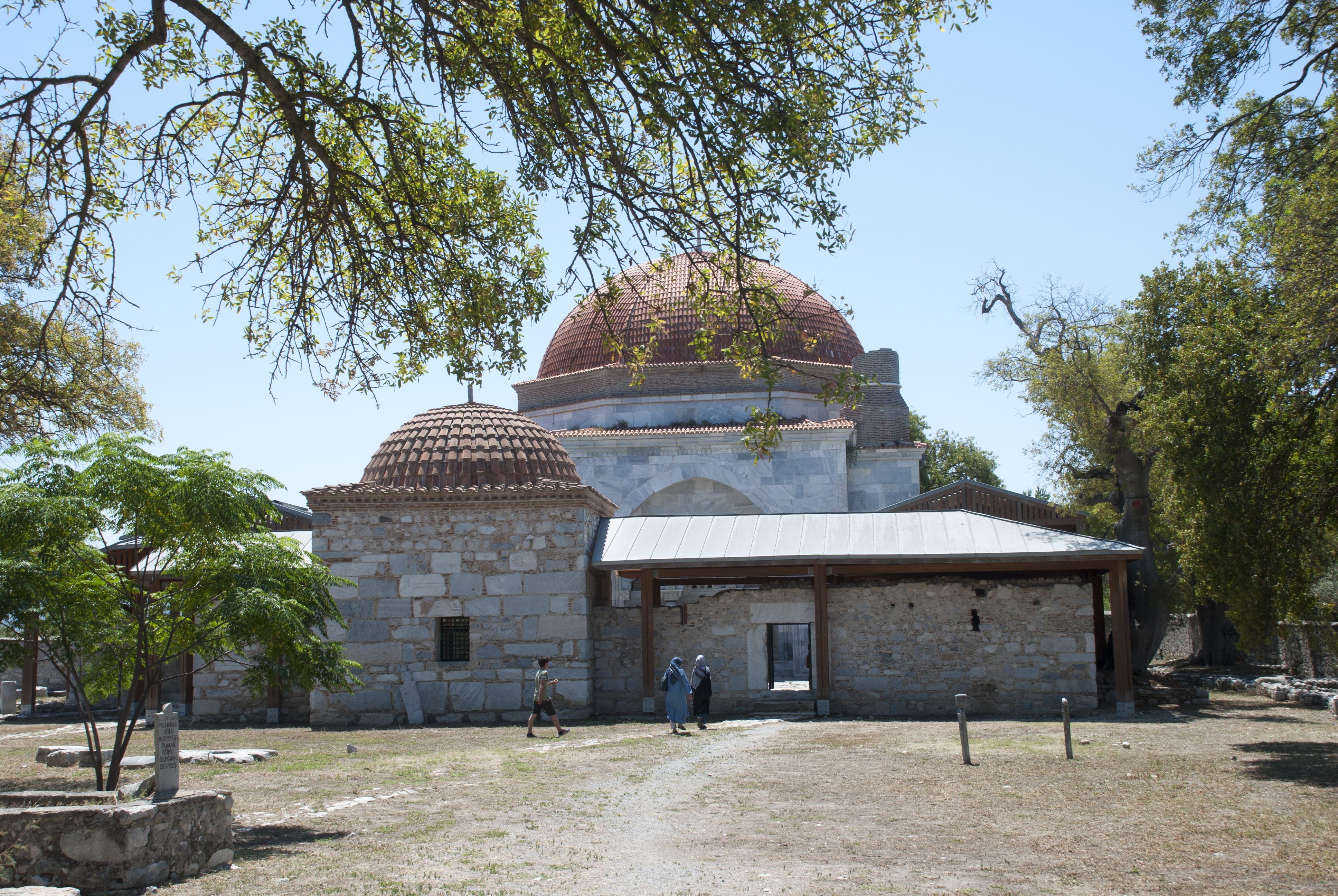 Milet antik kenti yakınlarında İlyas Bey Külliyesi